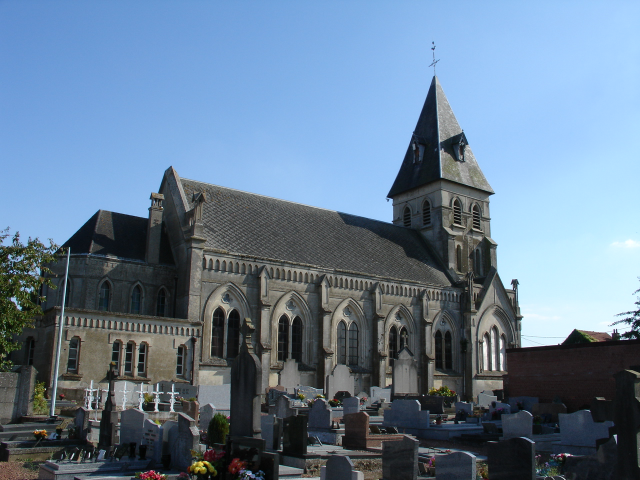 L'église d'Agny